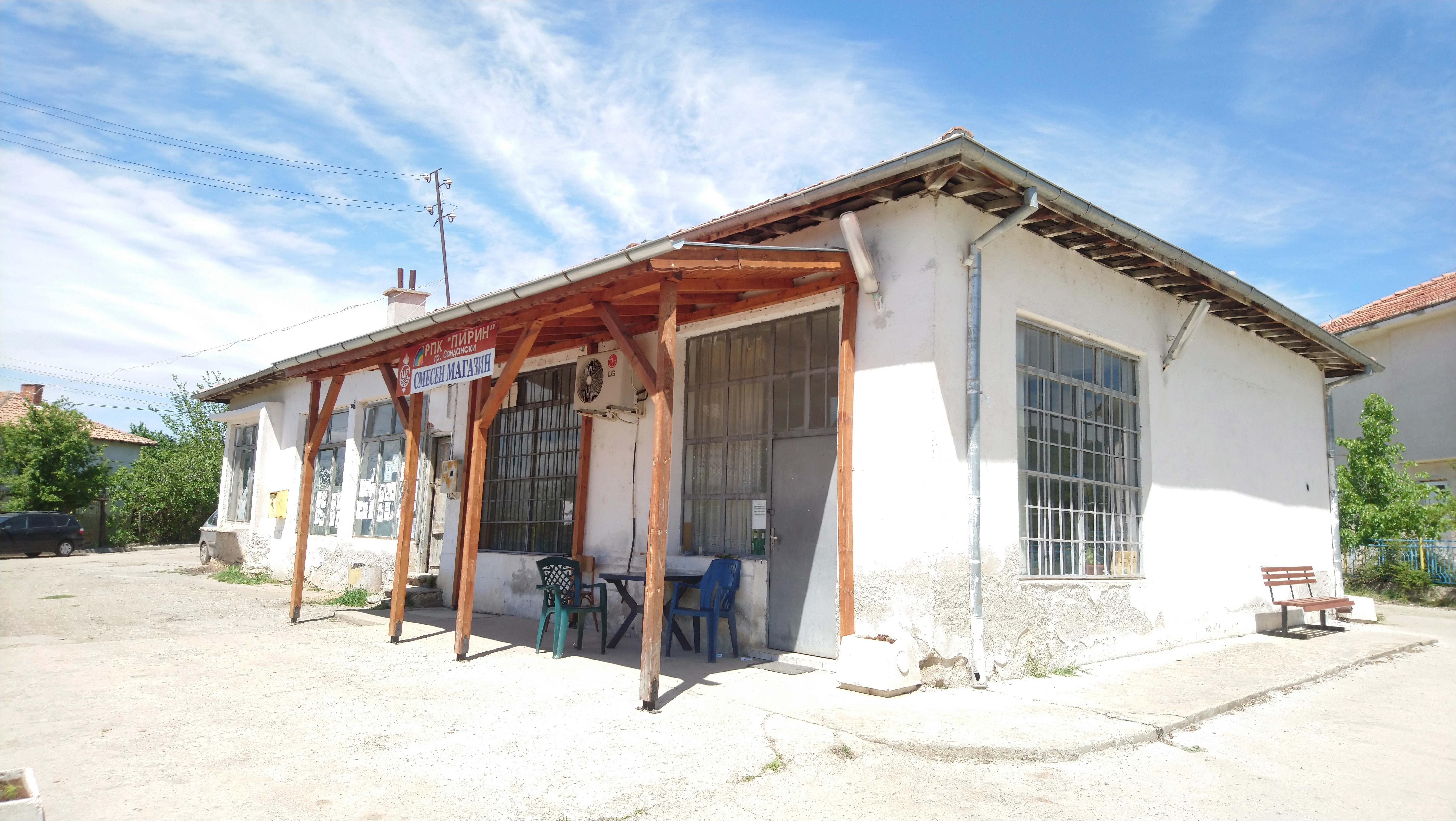 Смесеният магазин на село Яново